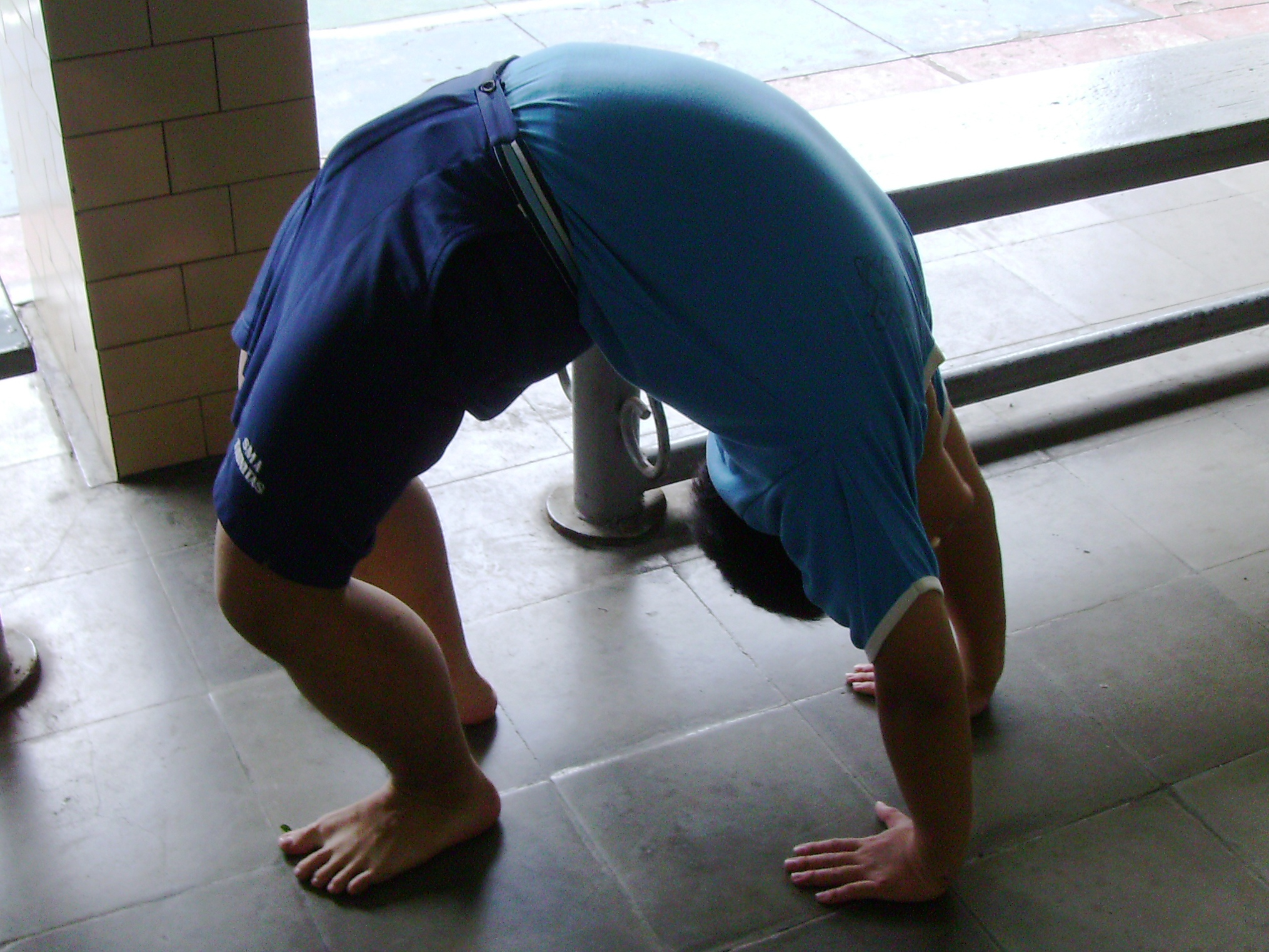 Sikap Jembatan